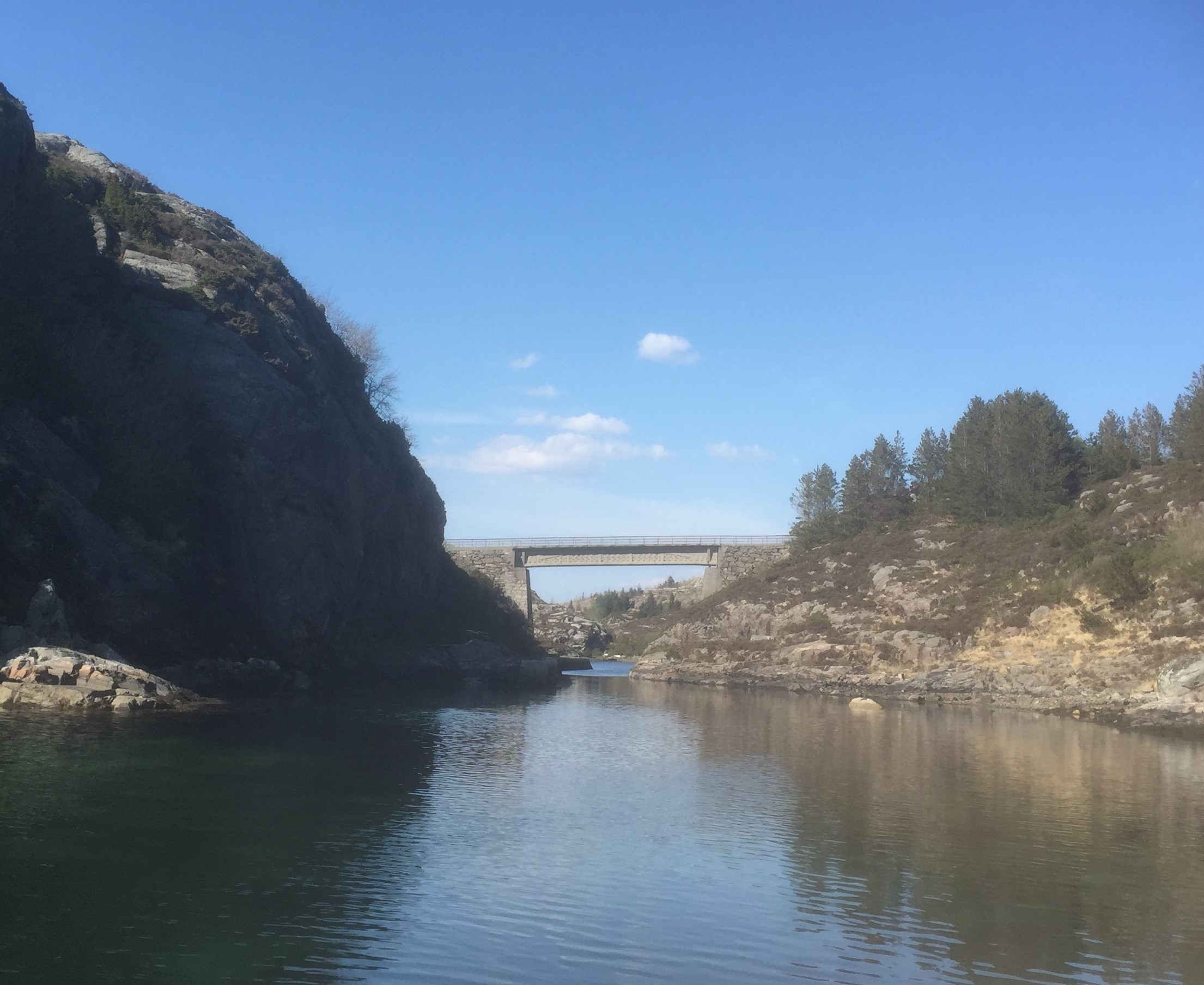 Goltastraumen og Golta bru